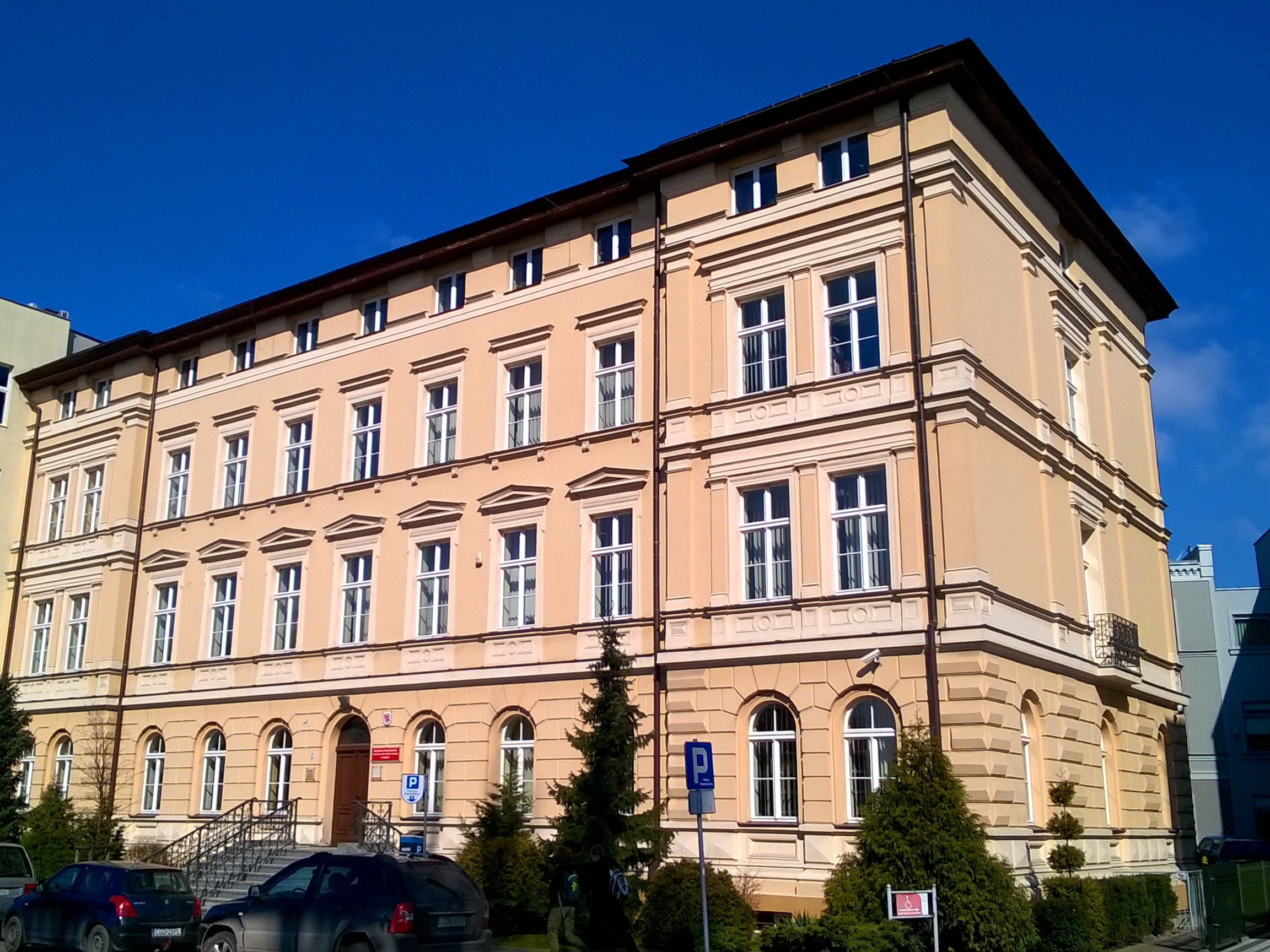 Biblioteka Pedagogiczna w Toruniu